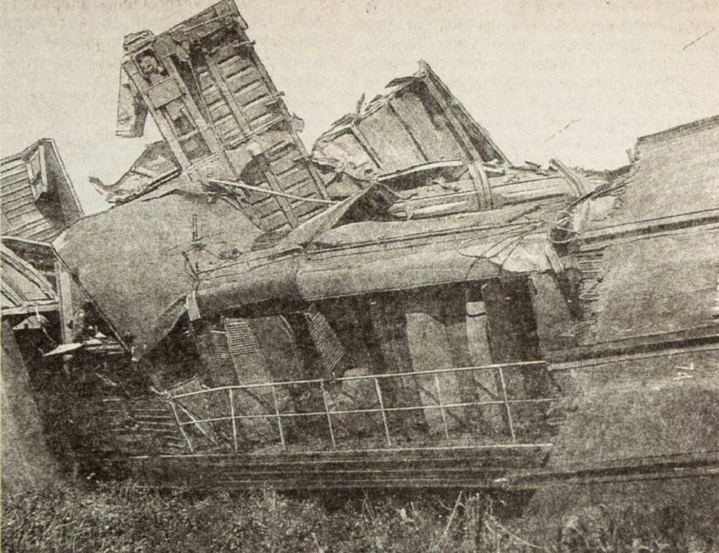 Разрушен в крушении на станции Гнивань Юго-Западной ж.д., произошедшем 7 июня 1991 года.